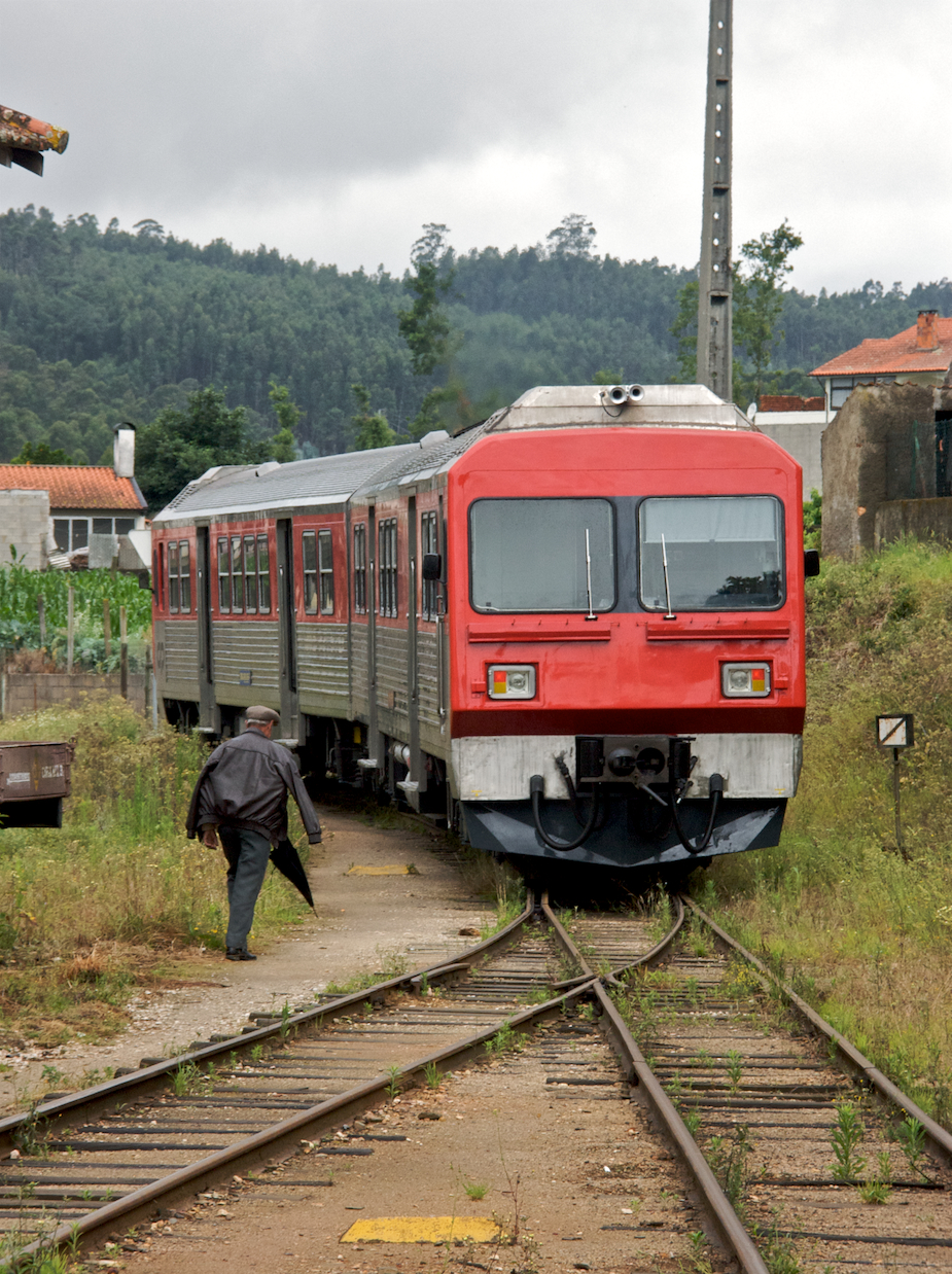 Tipo: Comboio Regional 5107 [Aveiro - Sernada do Vouga] Local: Macinhata do Vouga [Linha do Vouga, PK 2] Data e hora: 16 de Junho de 2008 [10h33] Material: Automotora 9636 [Unidade Dupla Diesel - Via Estreita]